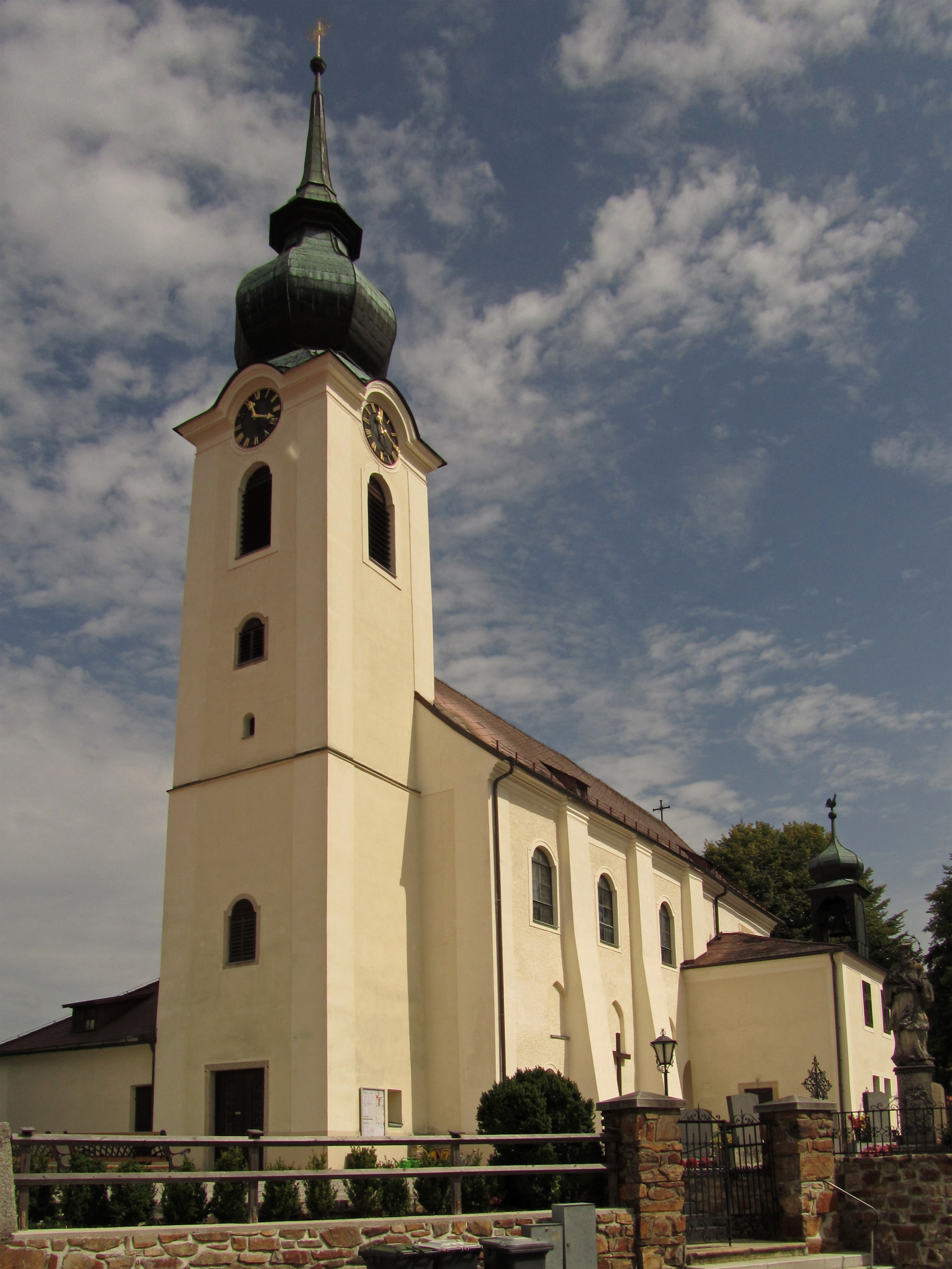 Kath. Pfarrkirche hl. Maria Magdalena in Altenmarkt